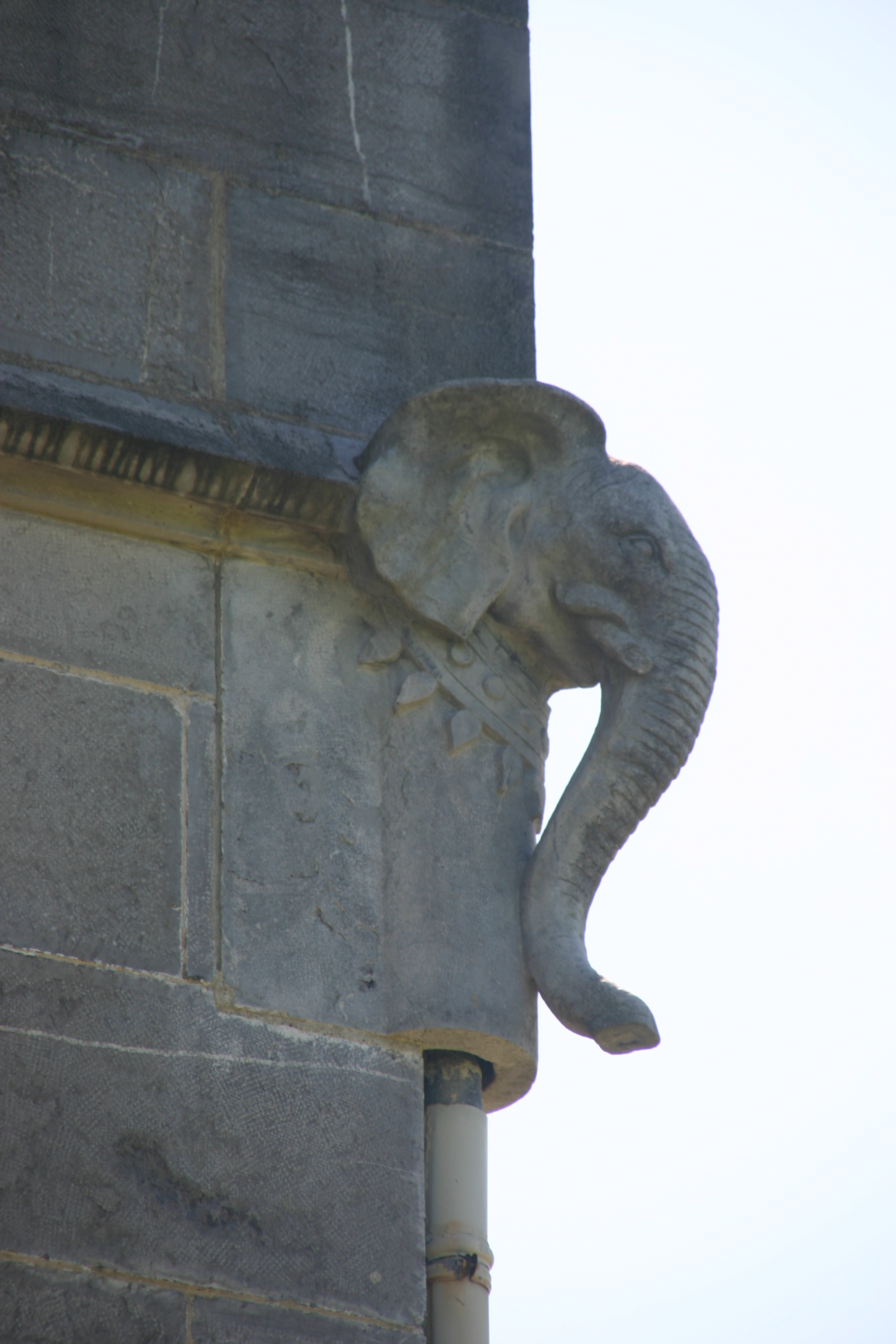 Sculpture du chateau d'Abbadia Hendaia Euskal Herria